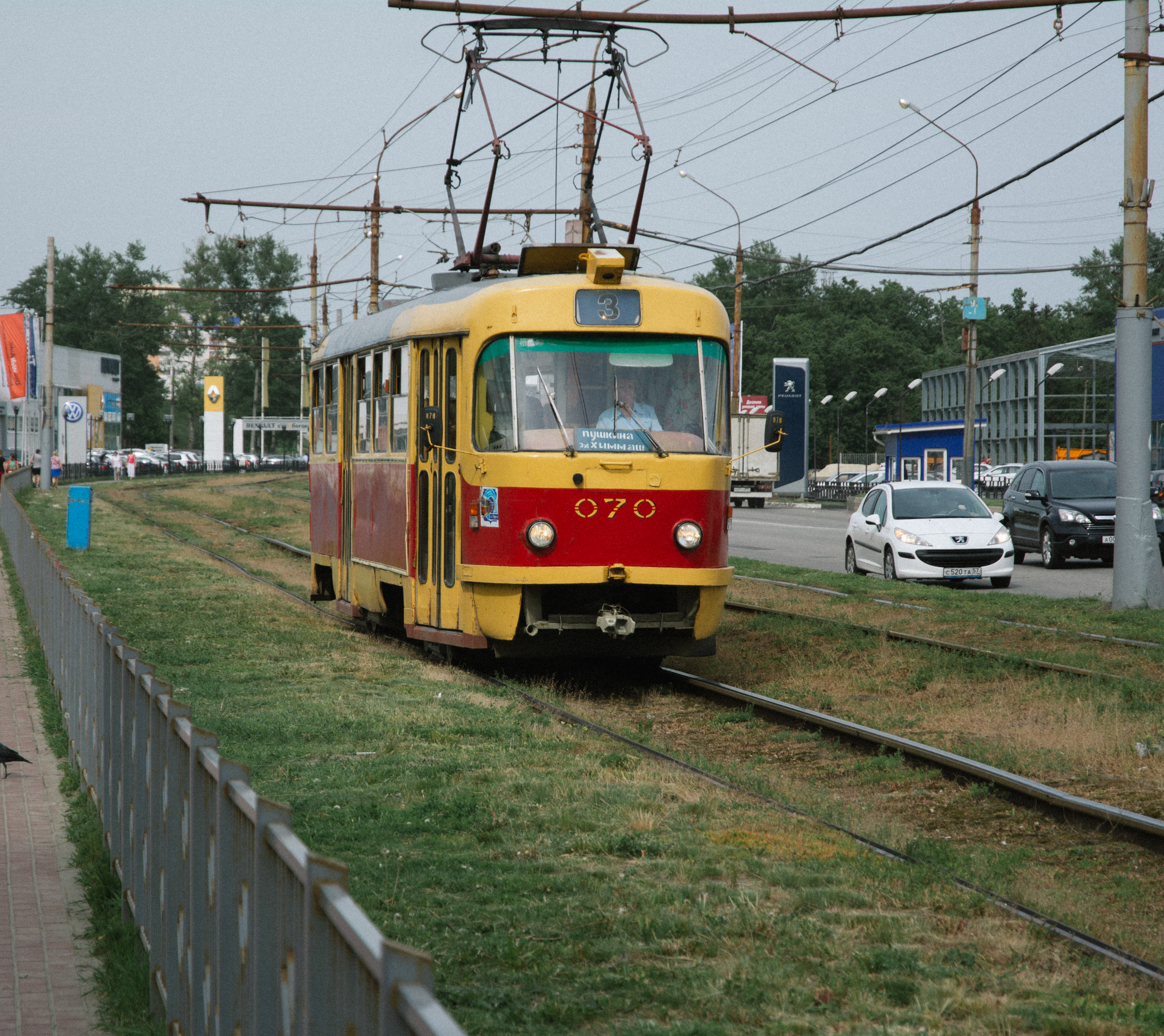 Орловский трамвай